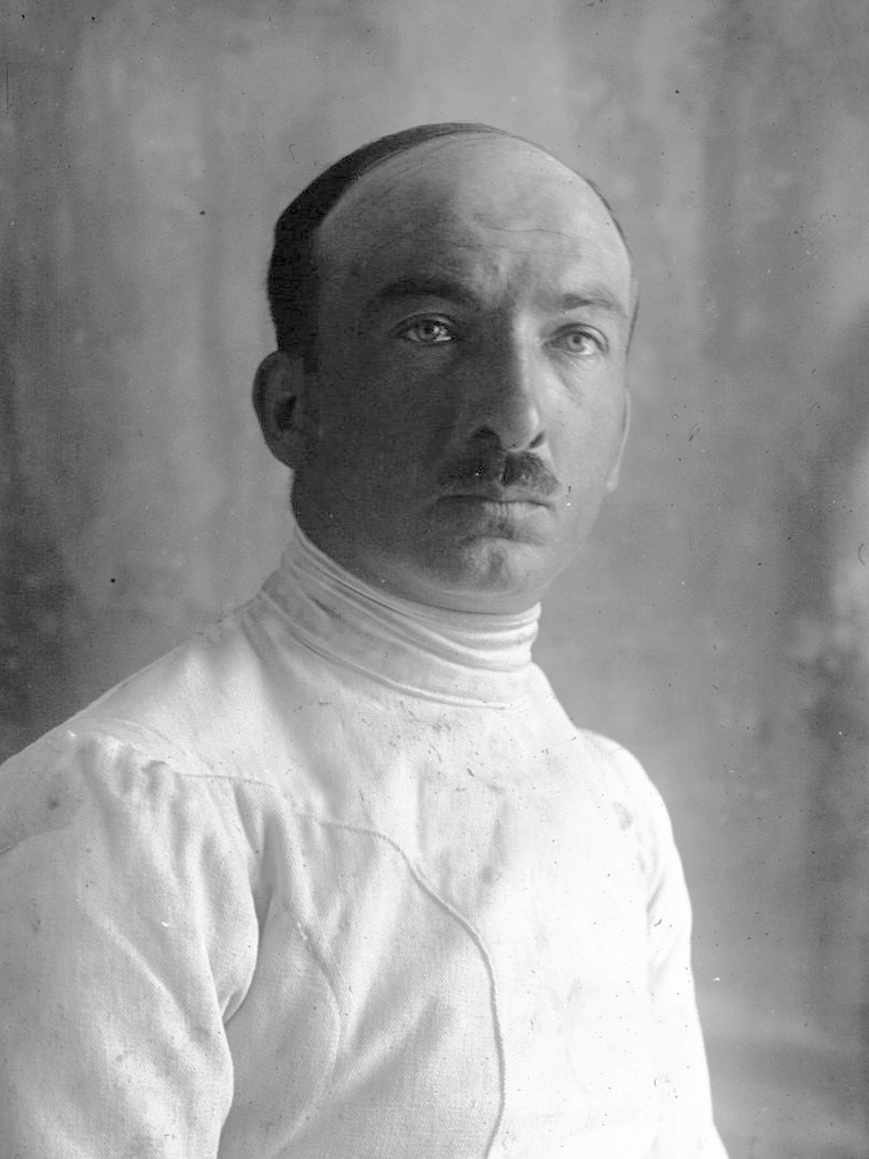 Tainturier, escrimeur : [photographie de presse] / Agence Meurisse